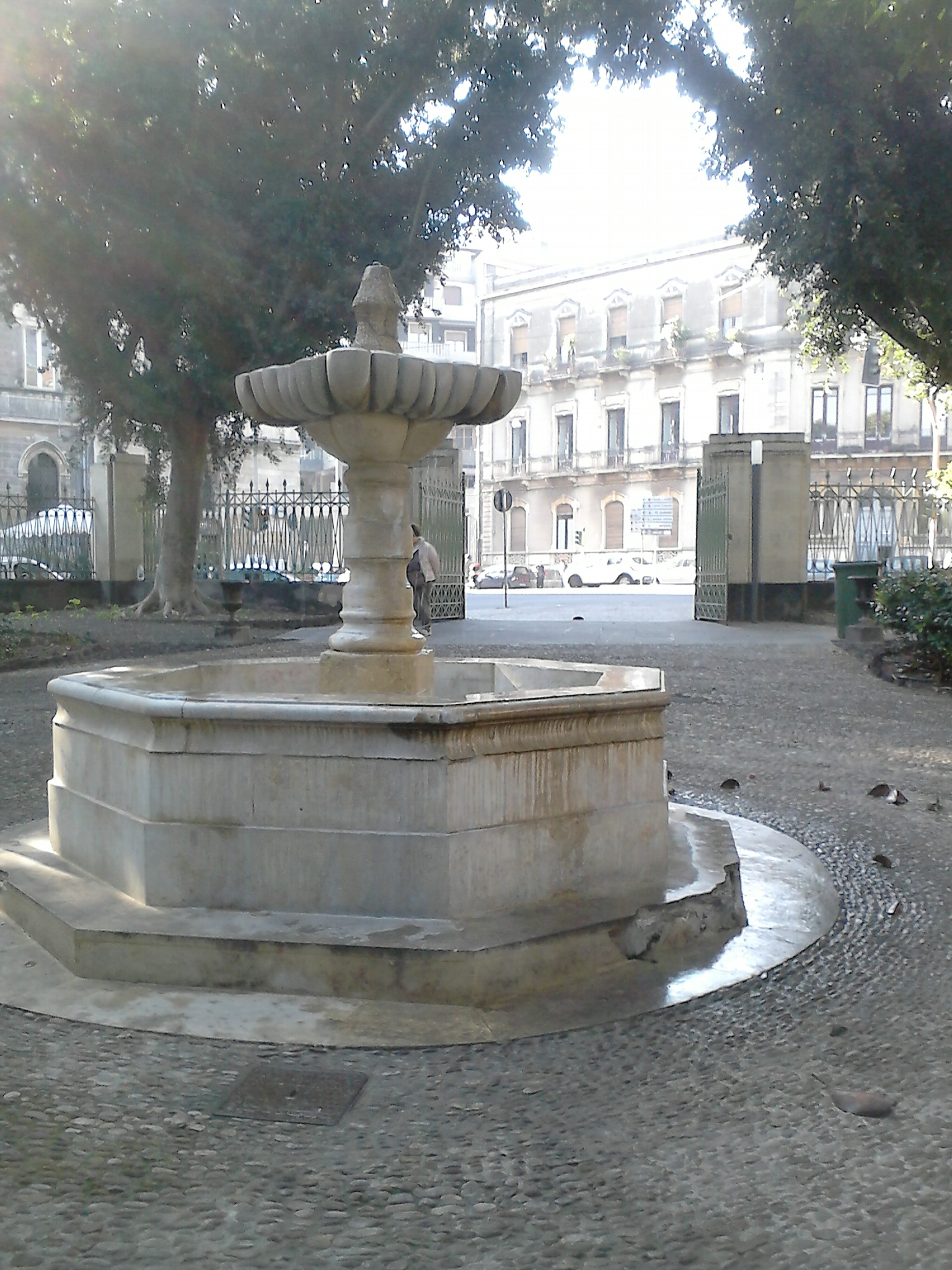 Ingresso ovest del Giardino Bellini, lato San Domenico